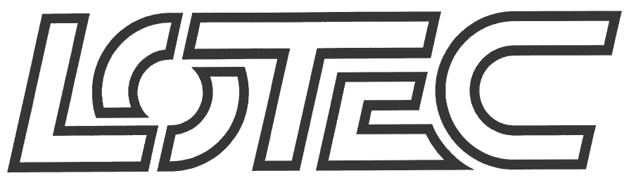 Logo des Automobilherstellers Lotec